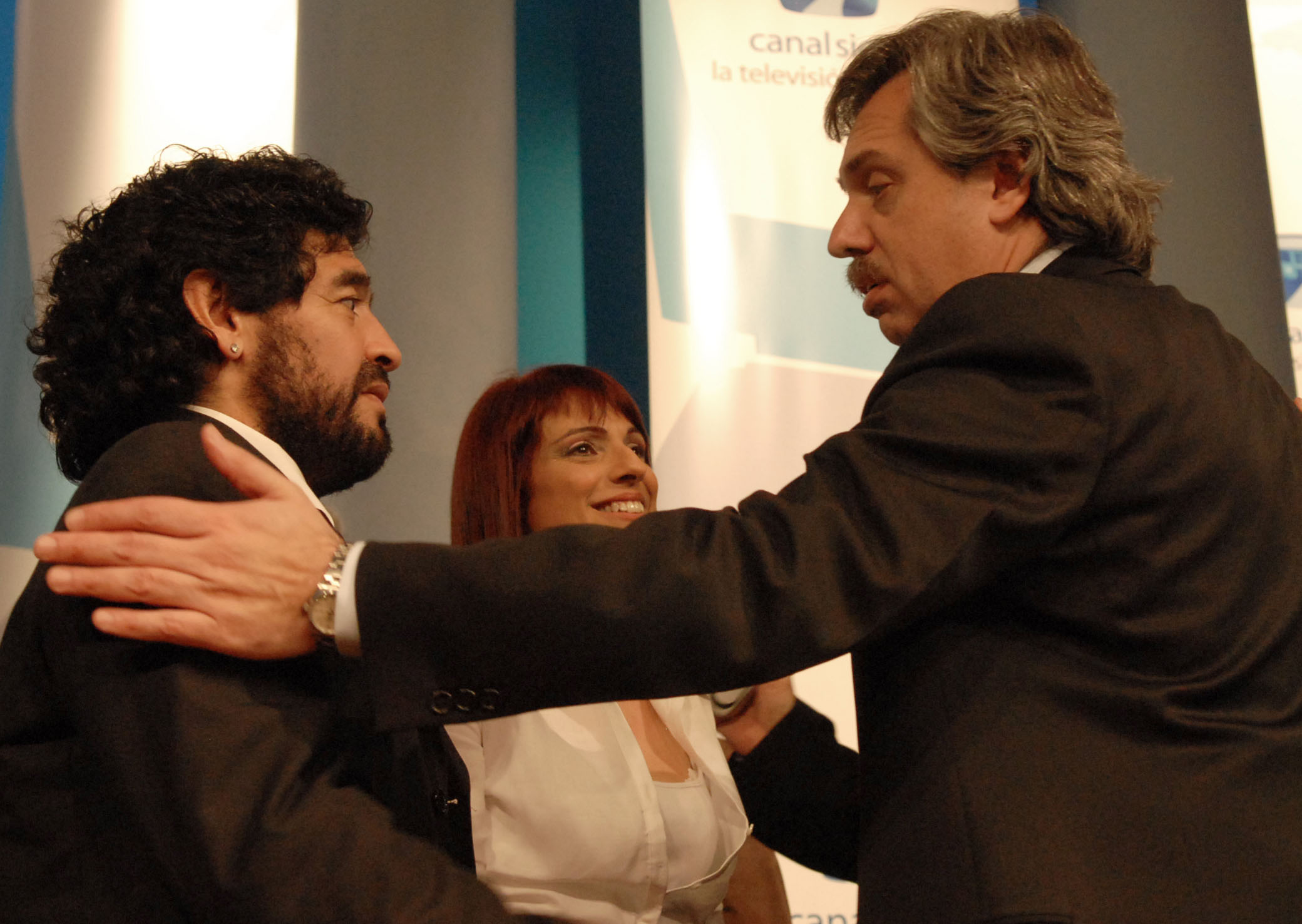 El Jefe de Gabinete Alberto Fernández, junto a la directora de Canal 7 Rosario Lufrano y Diego Armando Maradona, durante la presentación de la nueva programación de Canal 7.